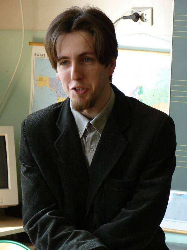 Marcin Mortka na Pyrkonie 2007